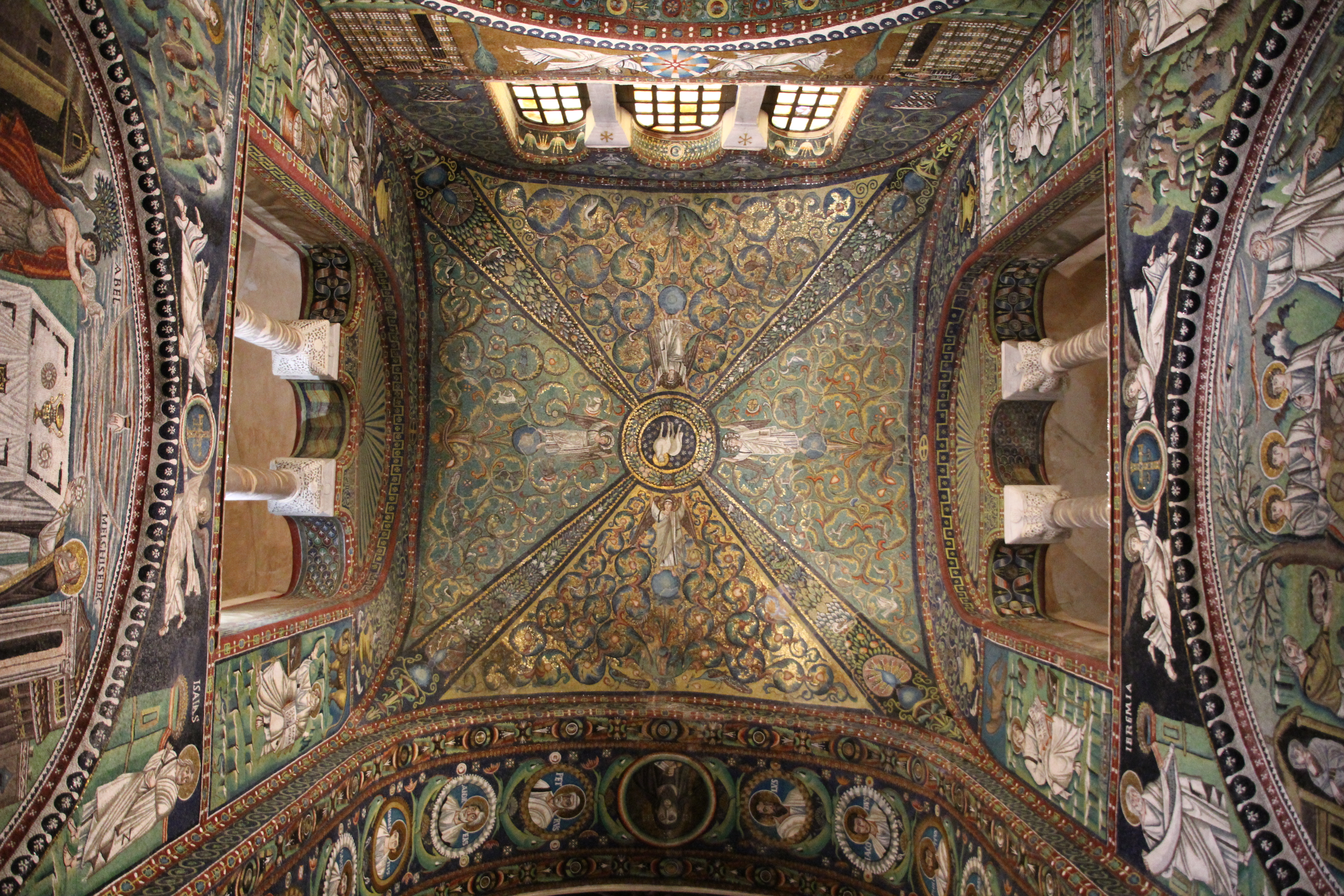 Ravenna, basilica di San Vitale